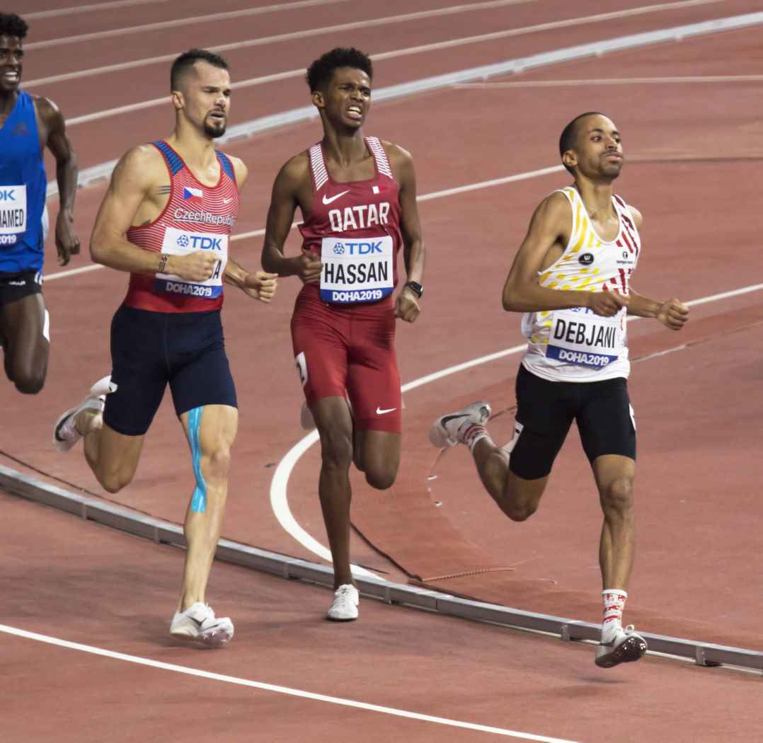 DOH70109 1500m men heats debjani